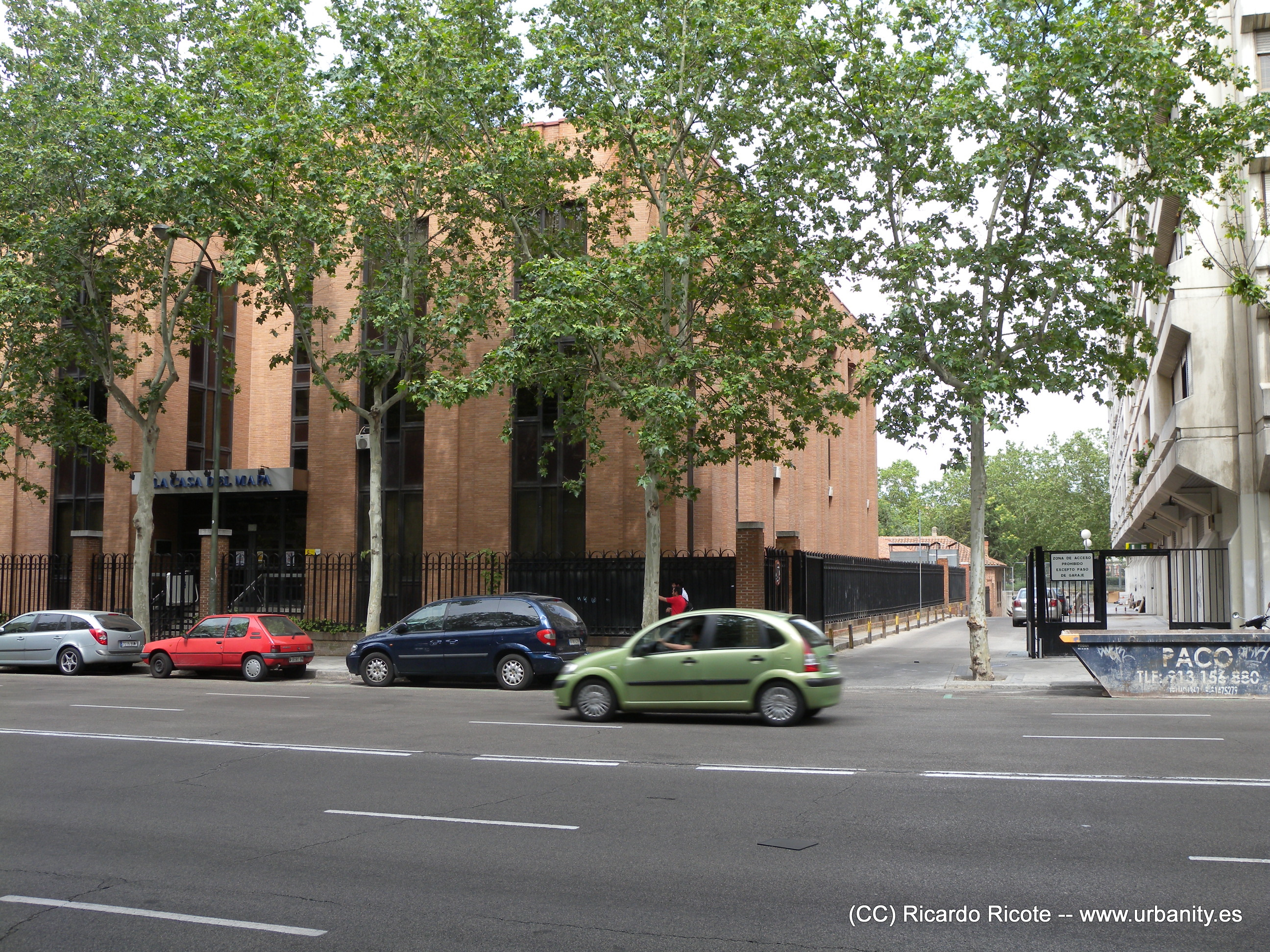 Instituto Geografico Nacional de España